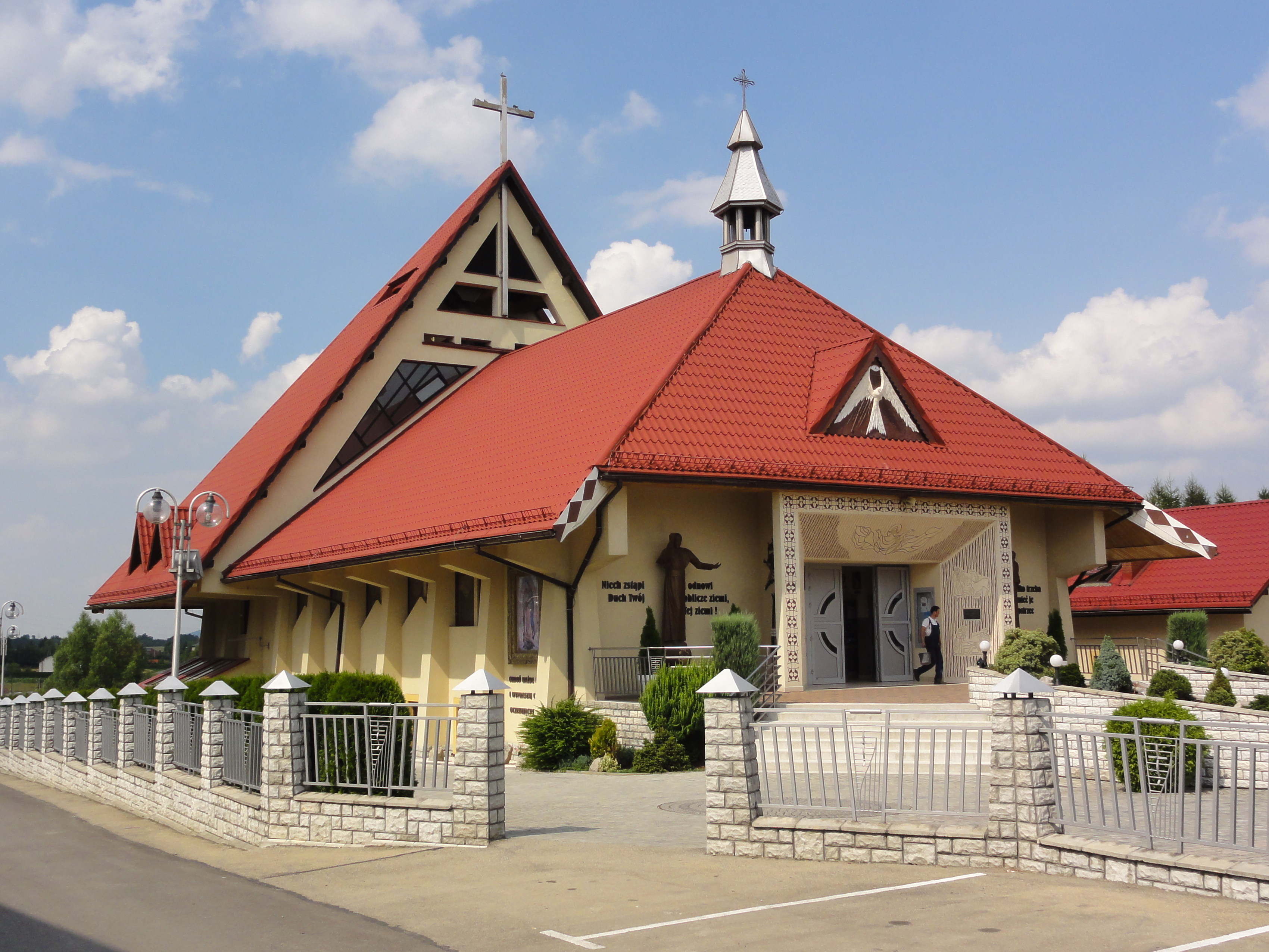 Kościół św. Antoniego w Kalnej